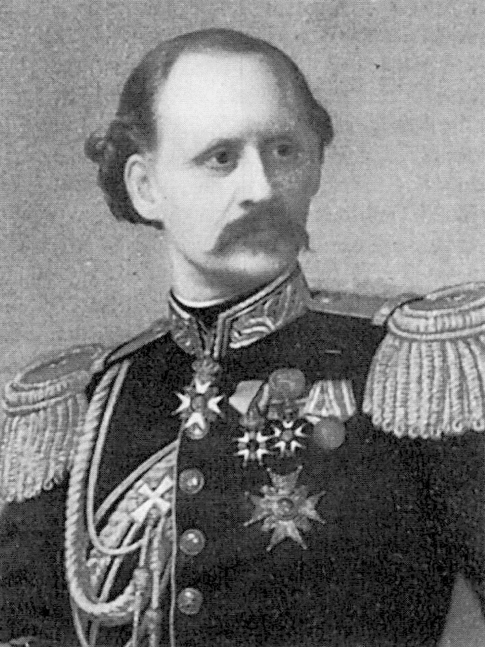 Den svenske generalen Hugo Raab (1831-1881).